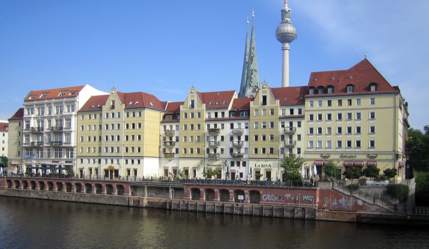 Berlin-Mitte. Nikolaiviertel, das Spreeufer.